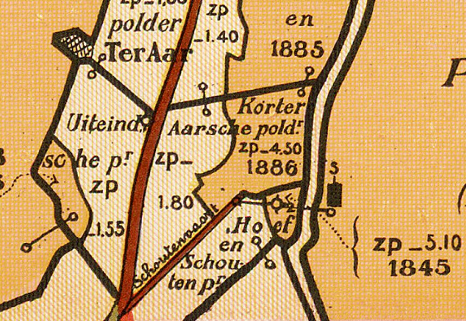 Korter Aarsepolder